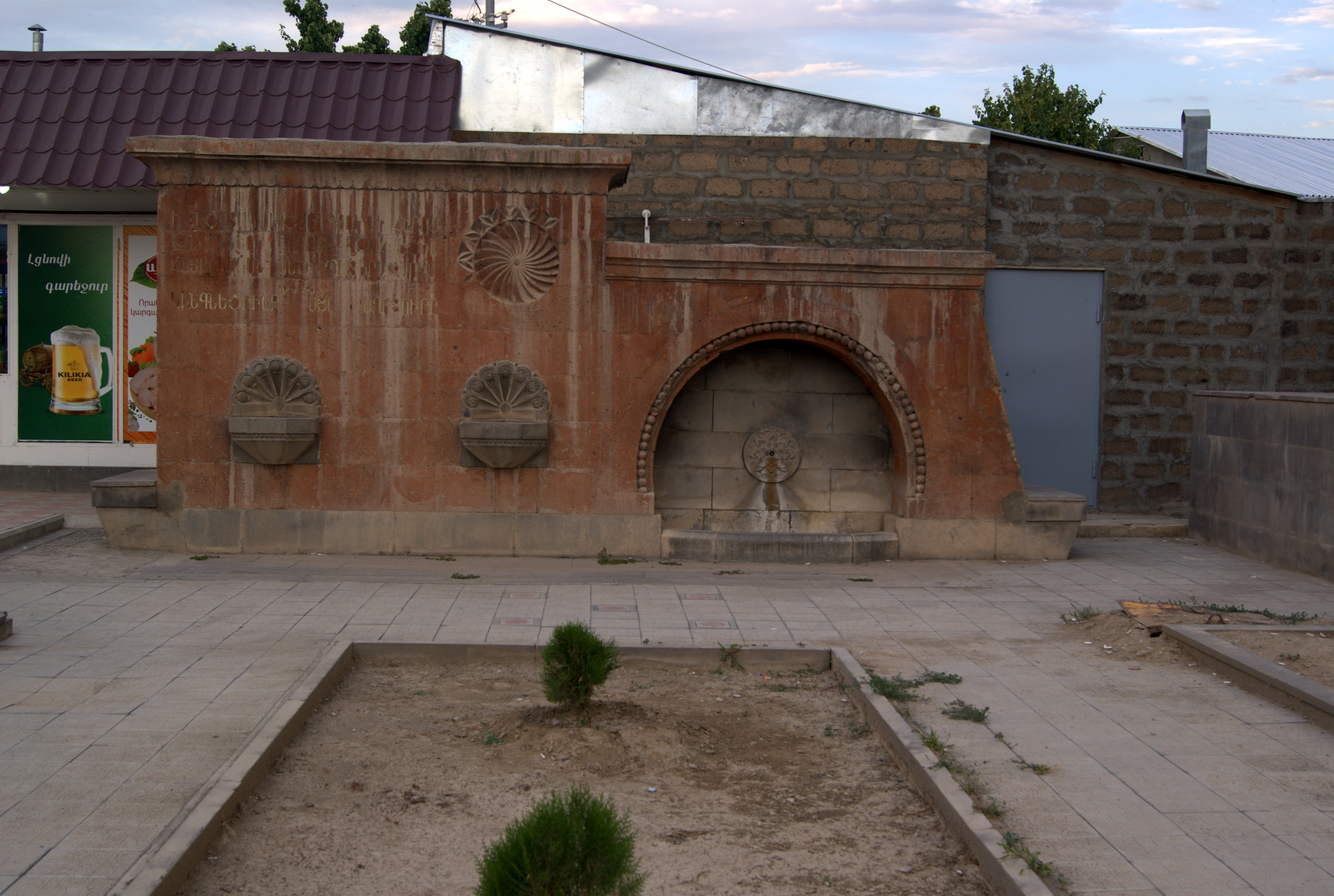 Հուշաղբյուր Երկրորդ աշխարհամարտում զոհվածներին, Ավշար 13/6